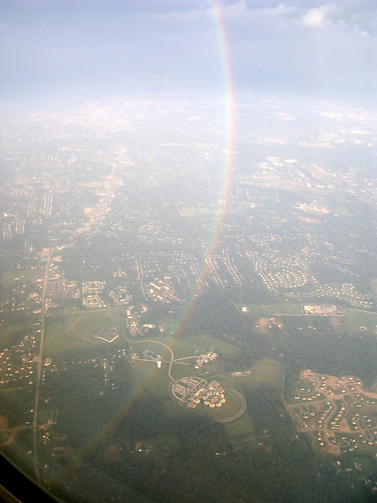 Fonte: :en:Image:360 rainbow.jpg A portion of a 360 degree rainbow, seen from an airplane while approaching the Philadelphia Airport. GiantGinkgo 19:36, 11 September 2006 (UTC) GiantGinkgo 19:39, 11 September 2006 (UTC)Patrick Spence